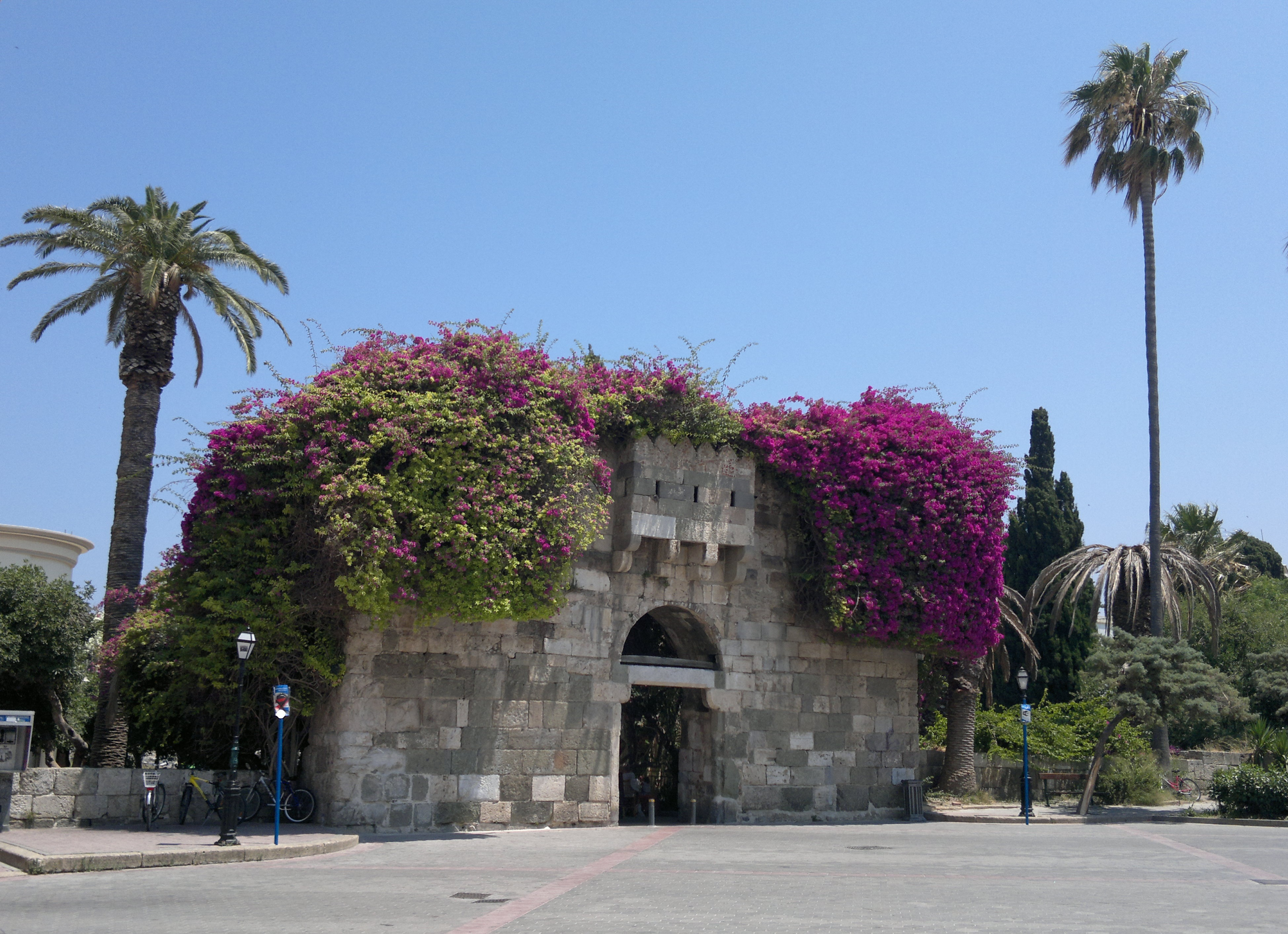 Tzv. Brána daní ve městě Kósu; Kós (GR)